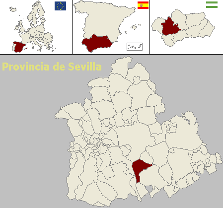 Mapa de localización del municipio sevillano de Arahal (Andalucía, España)